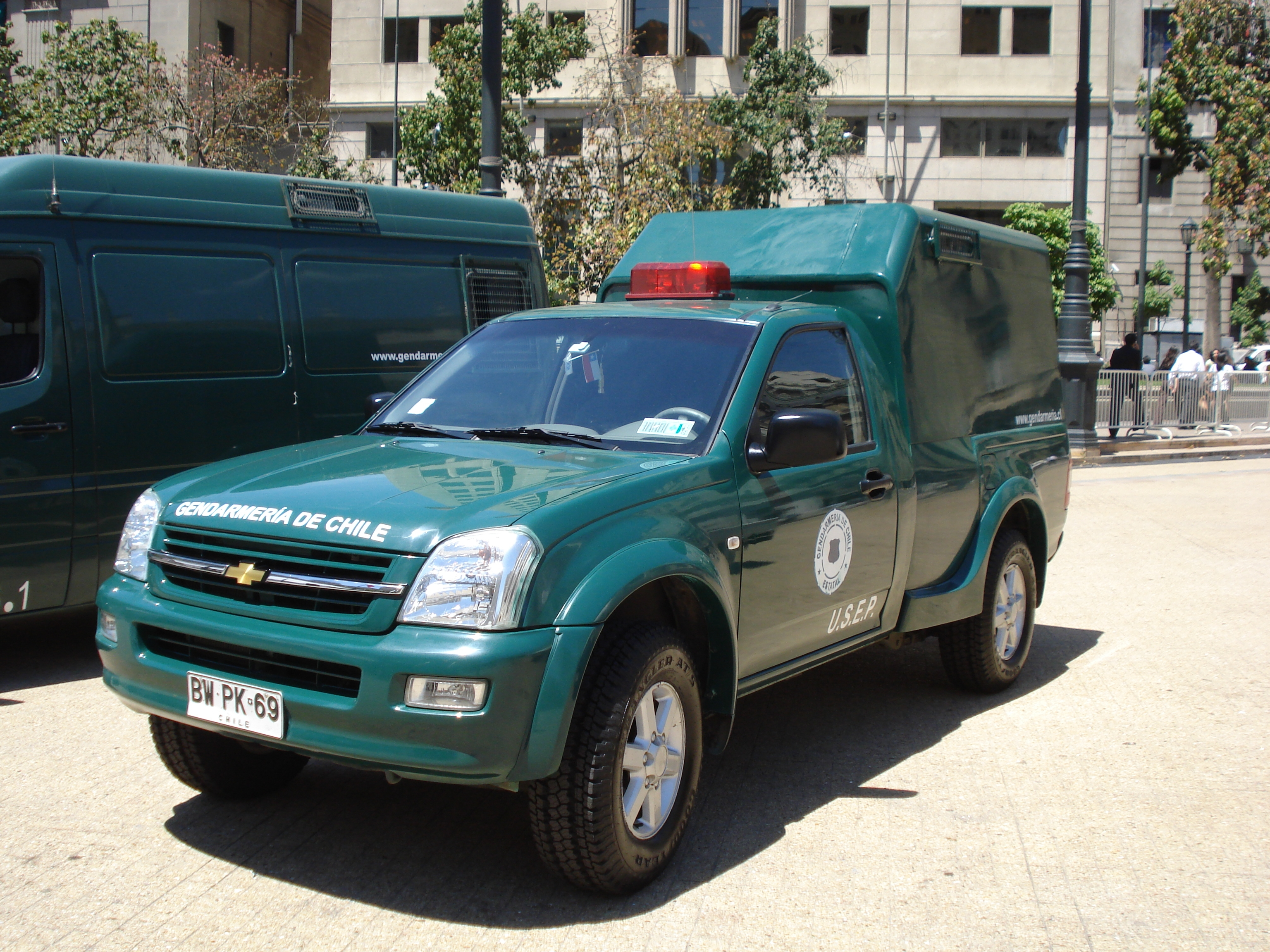 Camioneta de Gendarmería de Chile, Unidad de Servicios Especiales Penitenciarios (U.S.E.P.). Santiago de Chile.